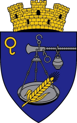 Stema orașului Cimișlia